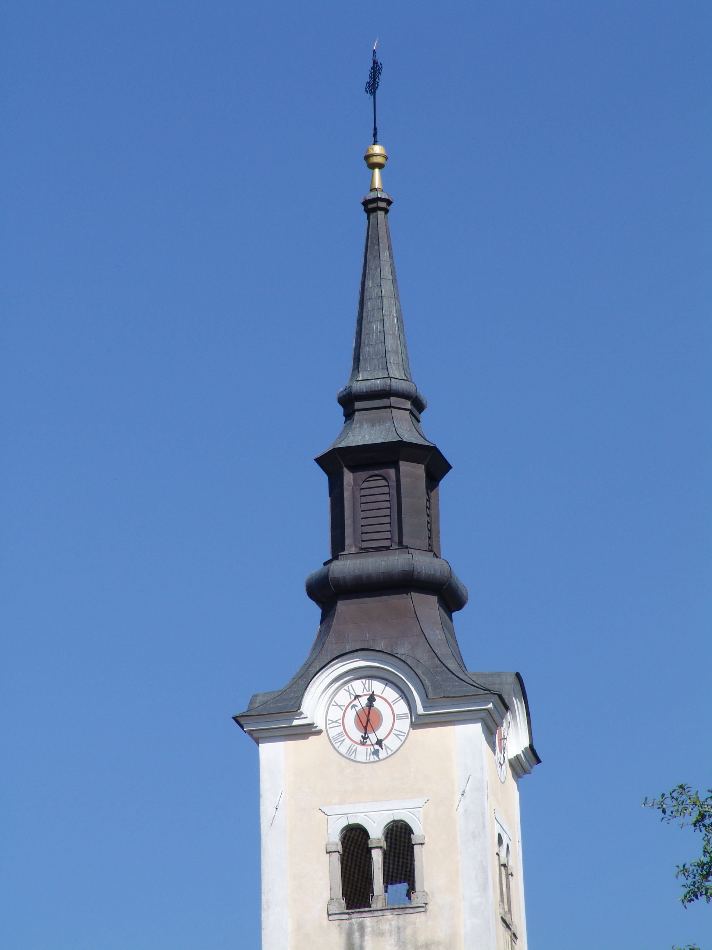 Biforna odprtina zahodne strani zvonika sv. Urha